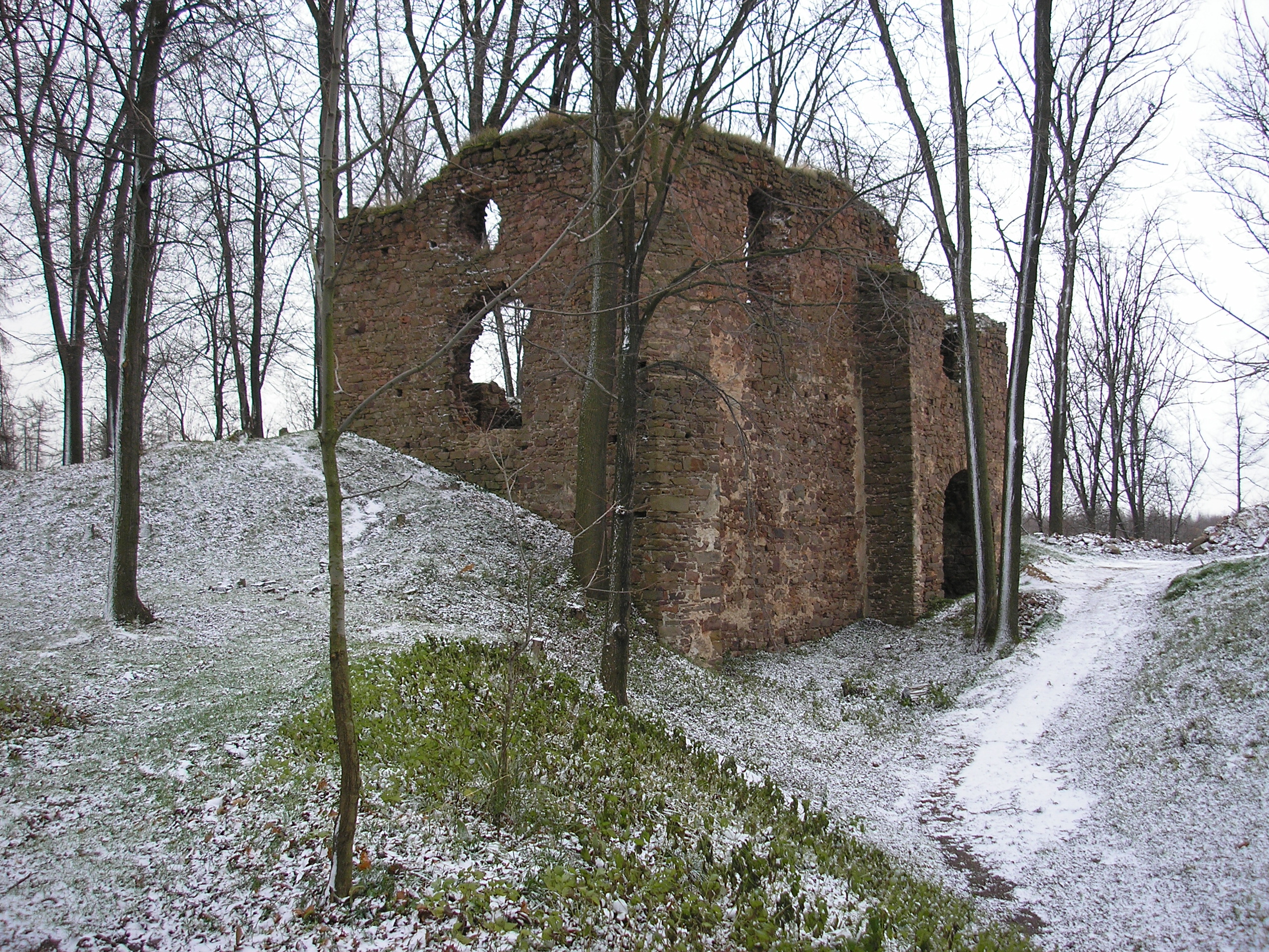 zřícenina hradu Fulštejn u obce Bohušov